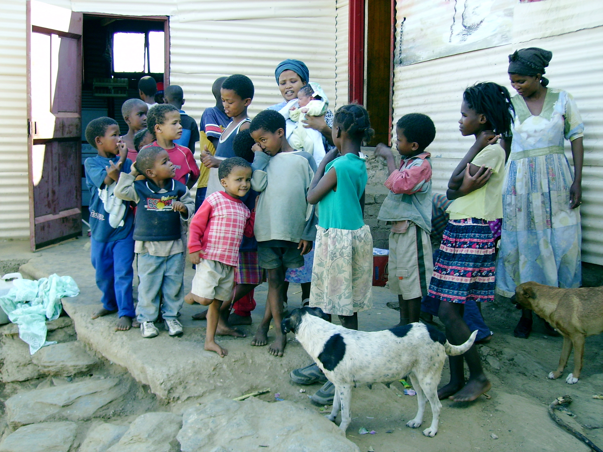 Kindergarten Pinocchio in Katutura